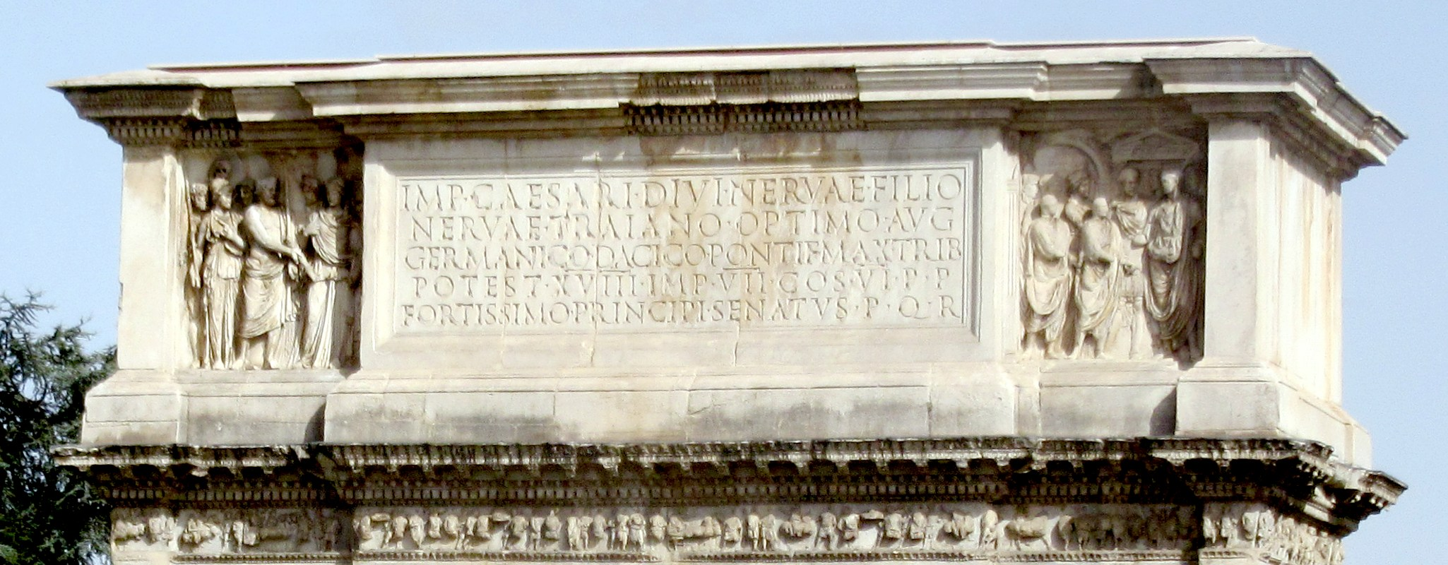 Benevento, Arco di Traiano, attico e iscrizione lato Sud-Ovest